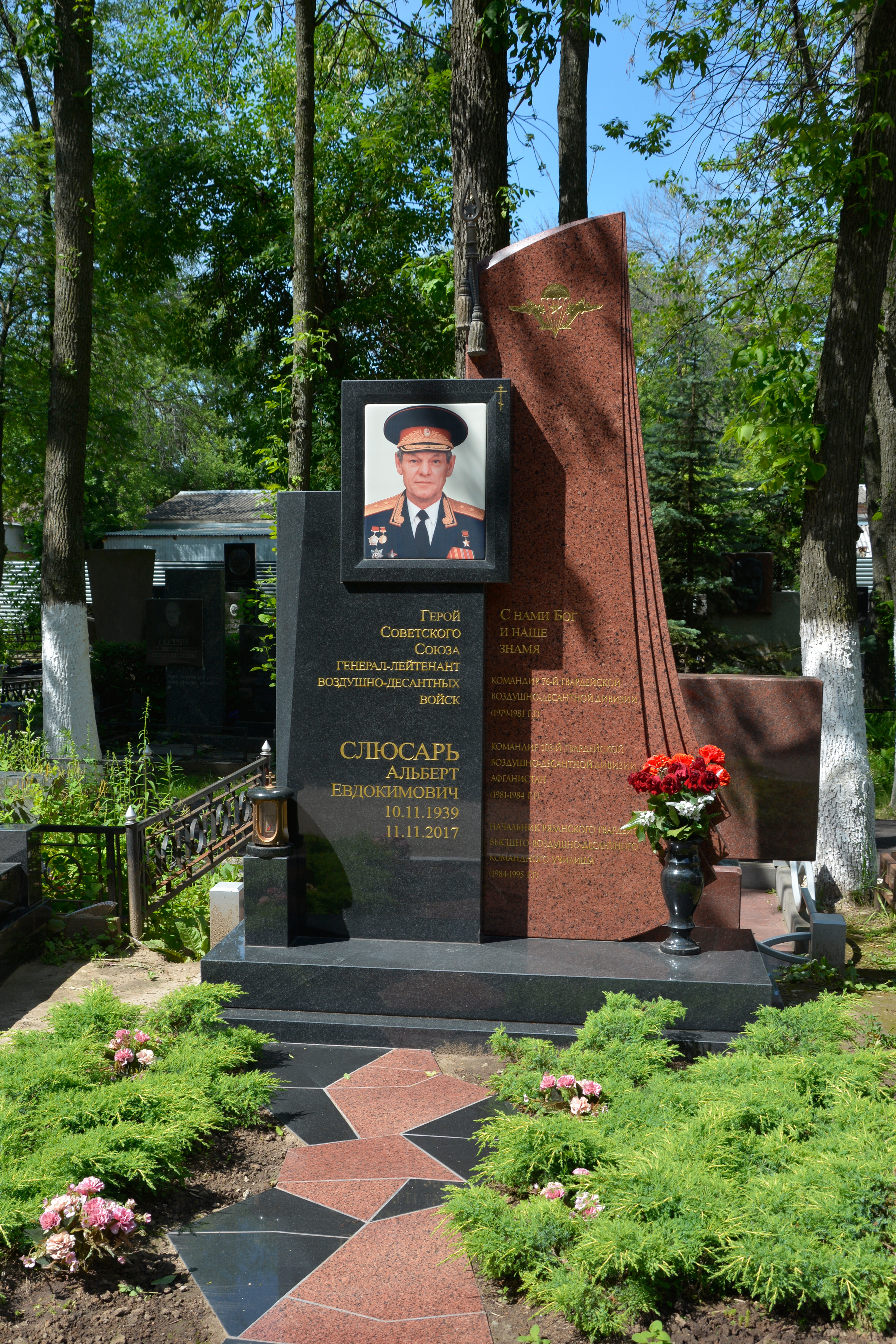 Могила Героя Советского Союза, генерал-лейтенанта Слюсаря Альберта Евдокимовича на аллее почётных захоронений Скорбященского кладбища г. Рязани. 25 июня 2020 г.